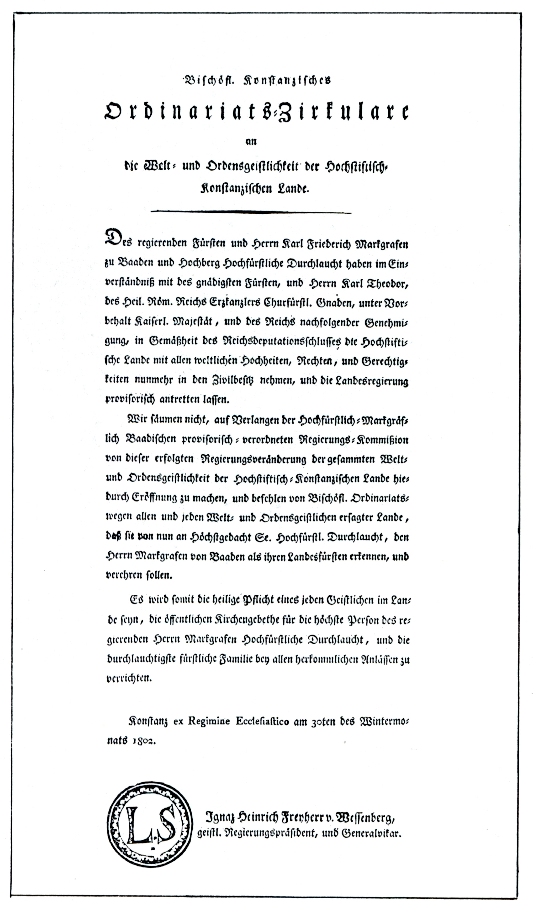 Bischöfliches Rundschreiben zum Übergang des Hochstifts Konstanz an Baden vom 30. November 1802. Generallandesarchiv Karlsruhe, 48/5632